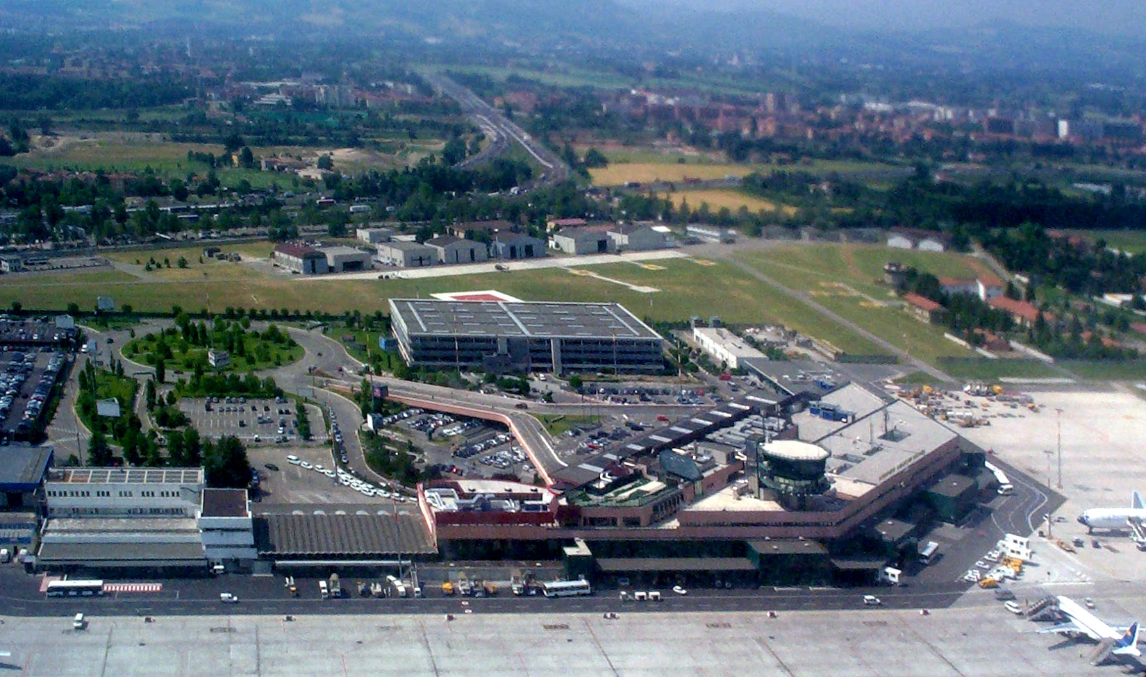 Veduta aerea dell'Aeroporto di Bologna-Borgo Panigale Categoria:Immagini di Bologna